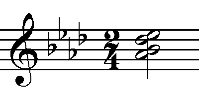 zenei módosítójelek - példák